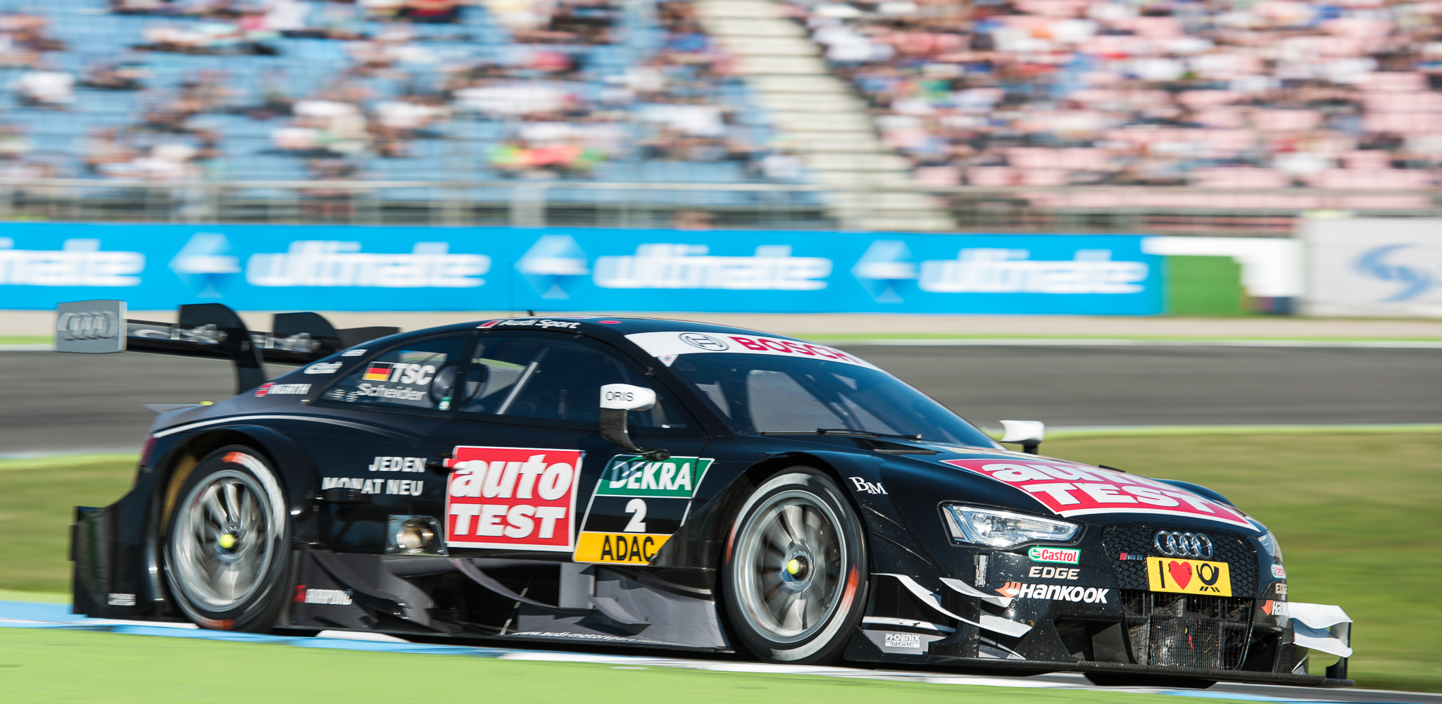 AUTO TEST Audi RS 5 DTM,DTM,Deutsche Tourenwagen Masters,Hockenheimring,Motorsport,Phoenix Racing GmbH,Timo Scheider